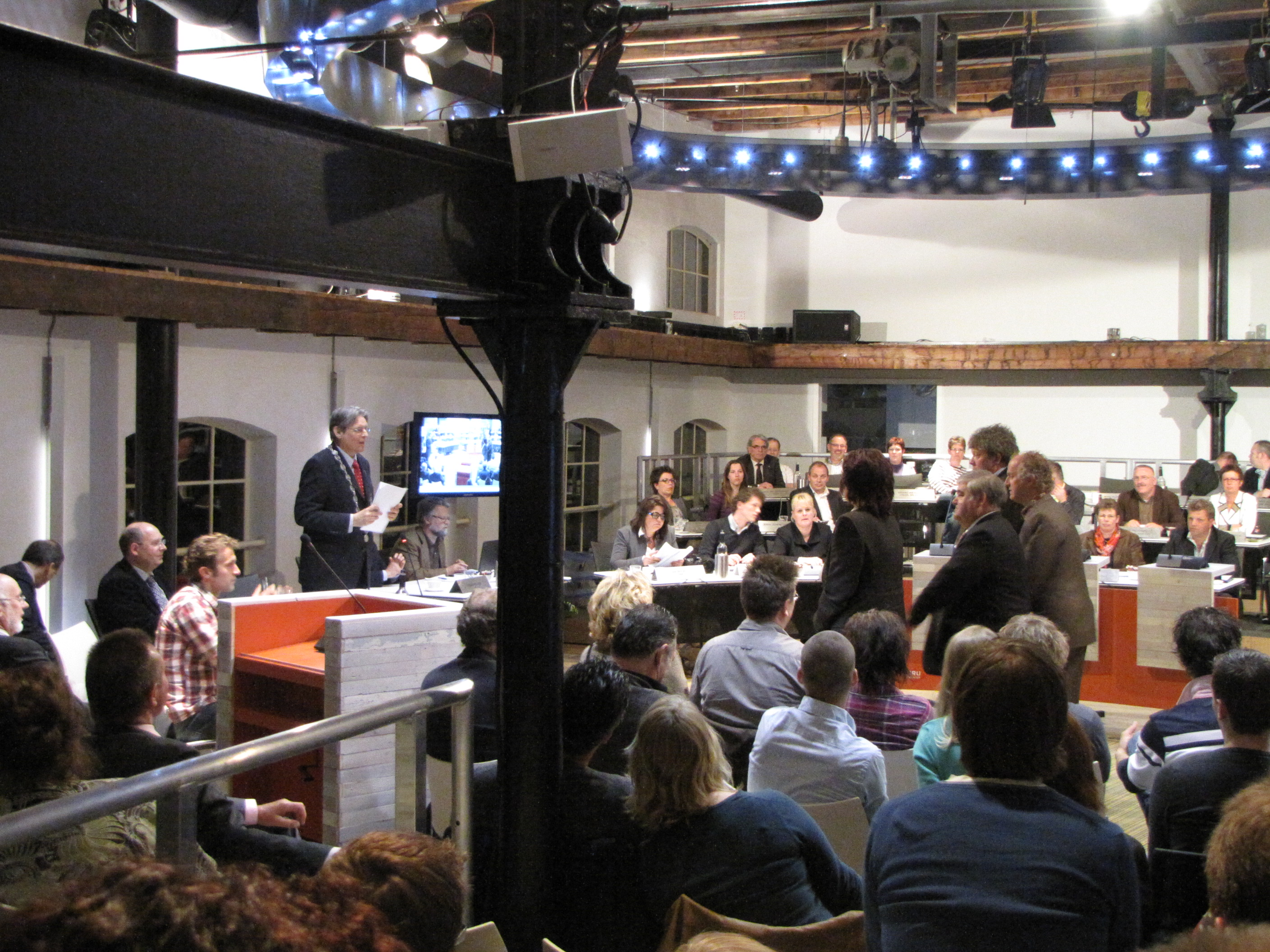 Beediging van de wethouders, gemeente Oude IJsselstreek. Links burgemeester Hans Alberse.